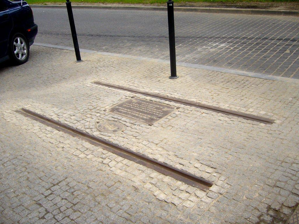 Fragment szyn tramwajowych i tablica pamiątkowa z napisem "Z tego miejsca 11.12.1895 r.odjechał pierwszy elektryczny tramwaj do Cygańskiego Lasu. W 1971 roku zlikwidowano linie tramwajowe. Miasto Bielsko-Biała 2008." znajdujące się na placu przed Dworcem Głównym.